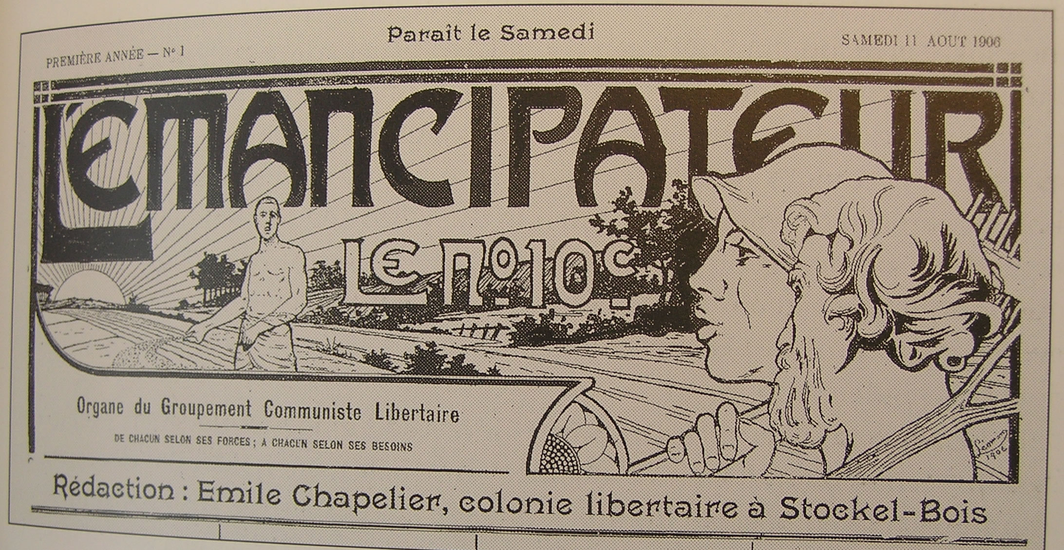 Journal édité par la colonie libertaire "L’expérience" à Stockel (Bruxelles), puis Boitsfort (Bruxelles) et fondée par Émile Chapelier - 1905-1908.